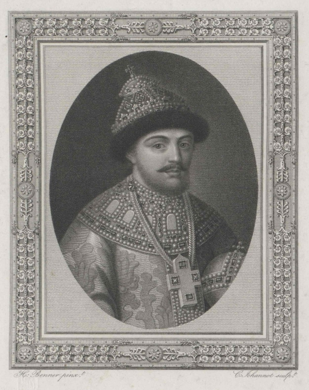 Fjodor III. Zar von Russland 1676-1682